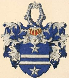 Ceumerni suguvõsa aadli- ja Ceumern-Lindenstjerna suguvõsa parunivapp